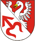 znak obce